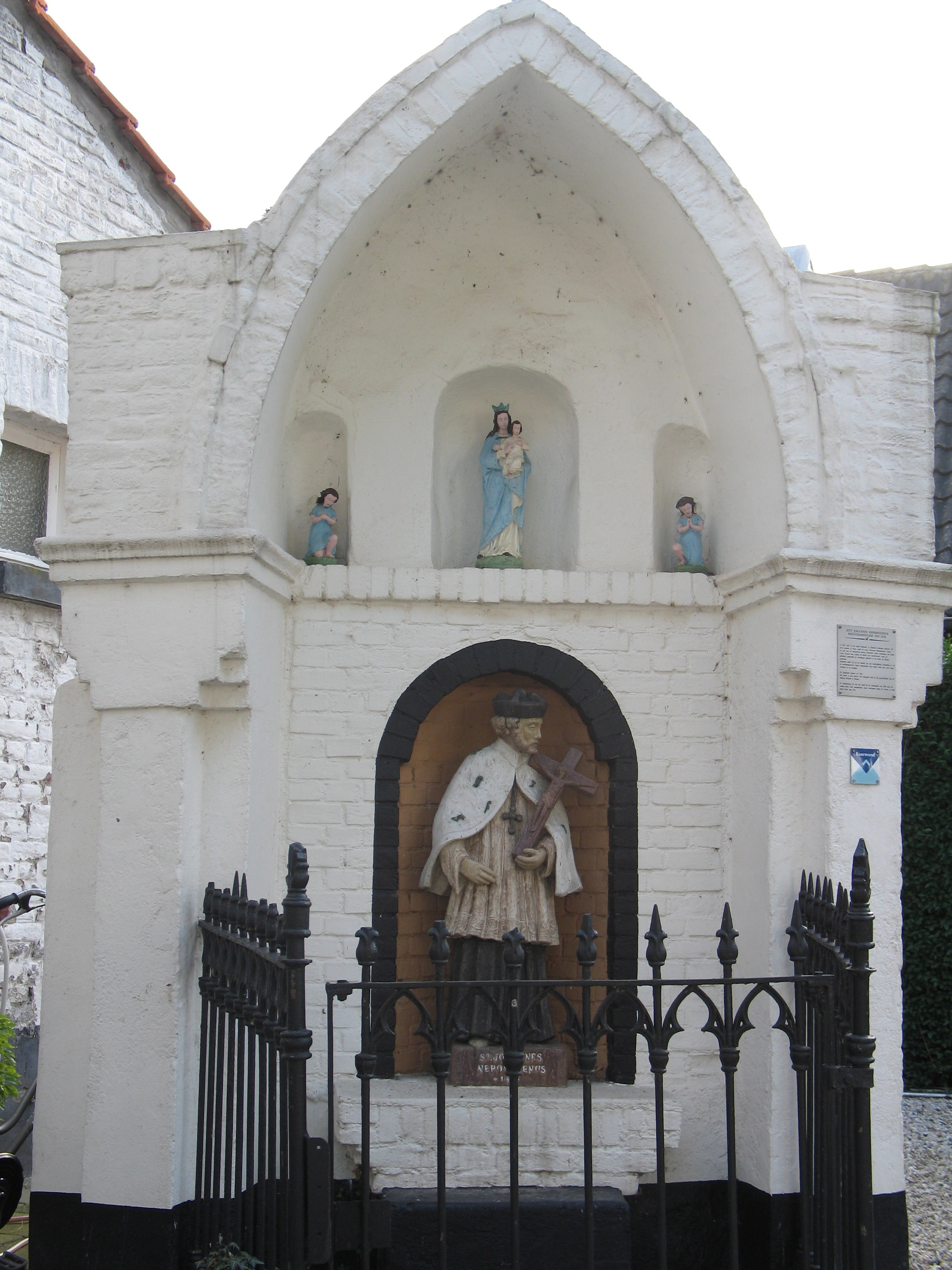 Wegkapelletje van de H. Joannes Nepomuc